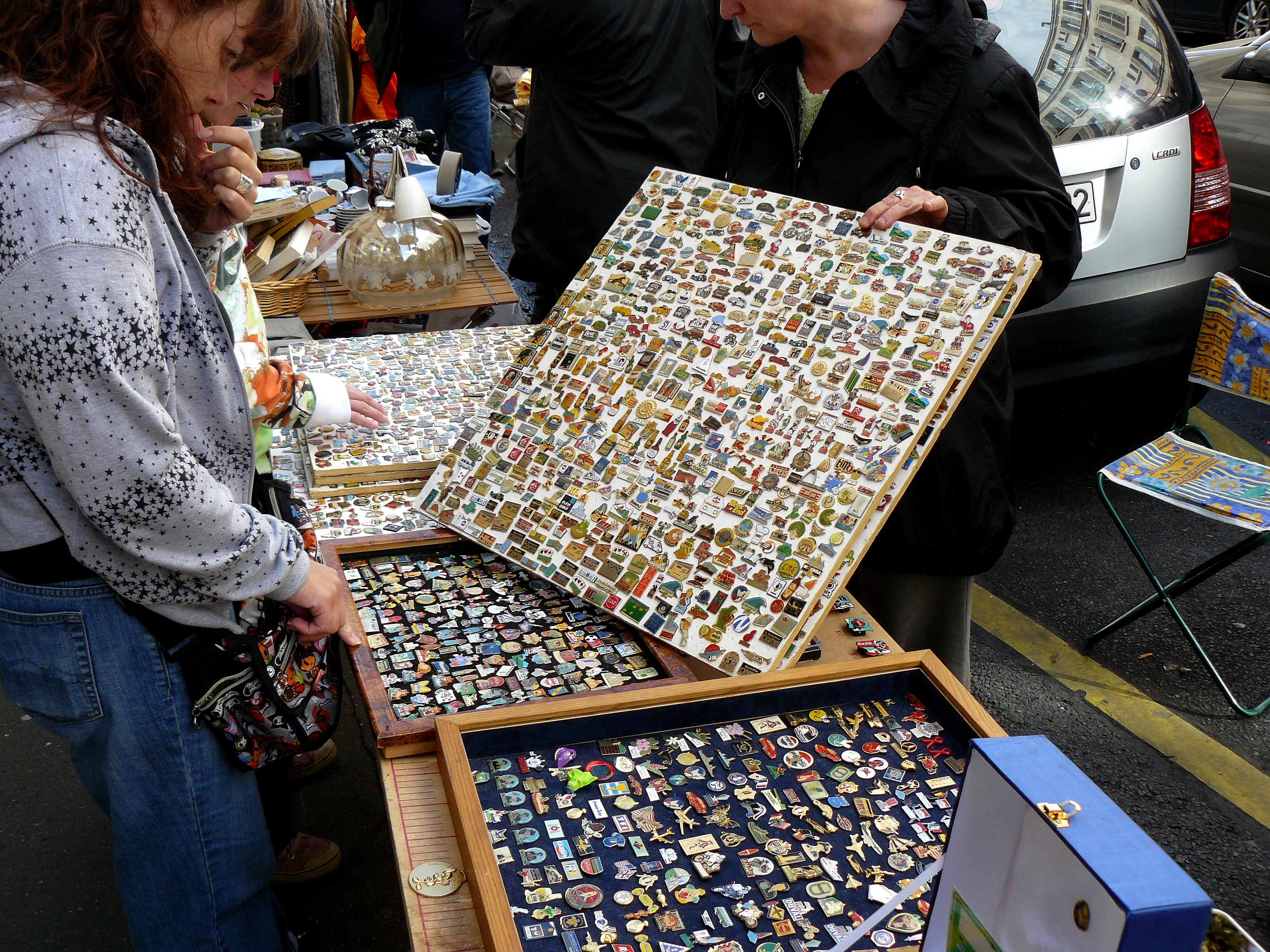 Sur un vide-grenier, un stand qui vend des Pin's, Paris, le 10 octobre 2009. La mode est passée, ne reste plus que quelques collectionneurs. Mais les Pin's attirent toujours les curieux.